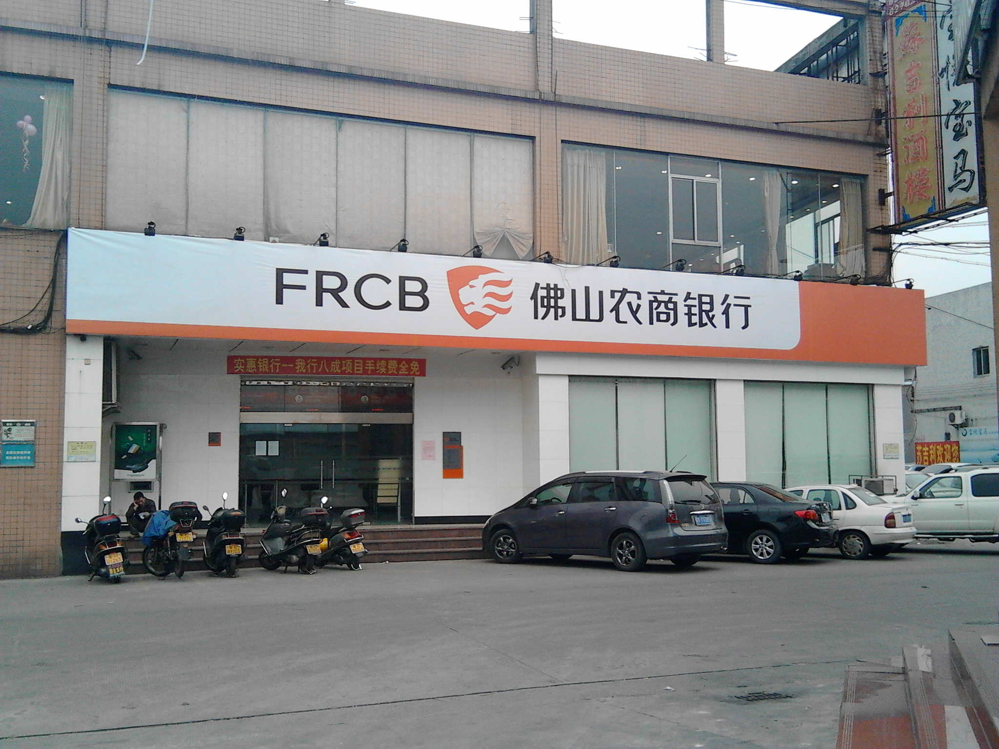 佛山农商银行的一家支行门口，用以示例。该支行位于佛山车城附近。